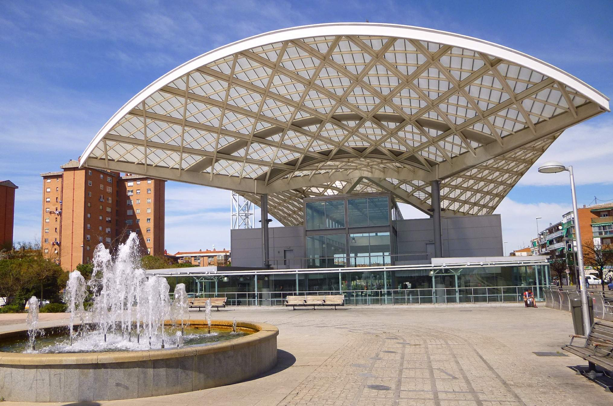 Estación de Asamblea de Madrid-Entrevías, en Puente de Vallecas, Madrid